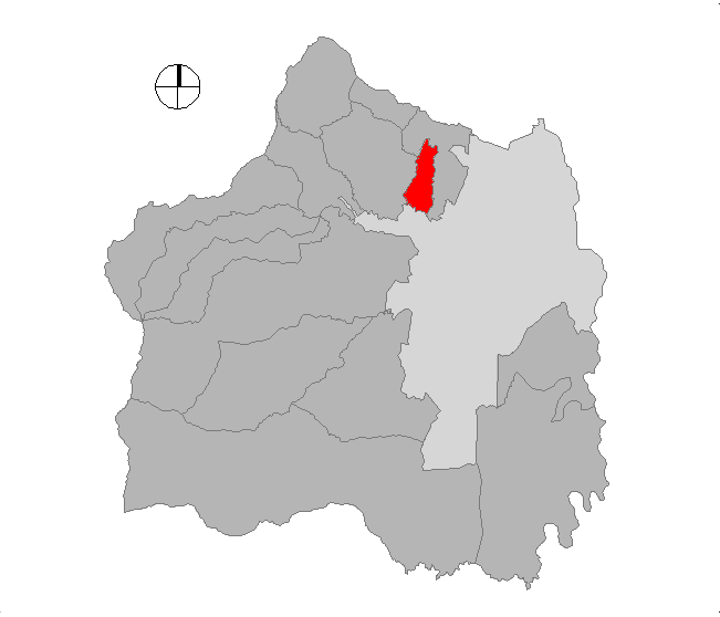 Corregimiento de Cali, Colombia